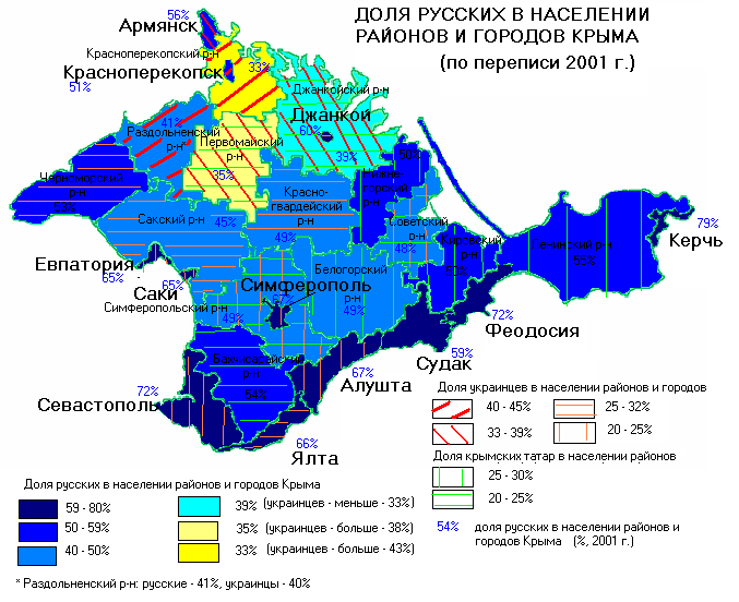 этнокарта Крыма (2001)